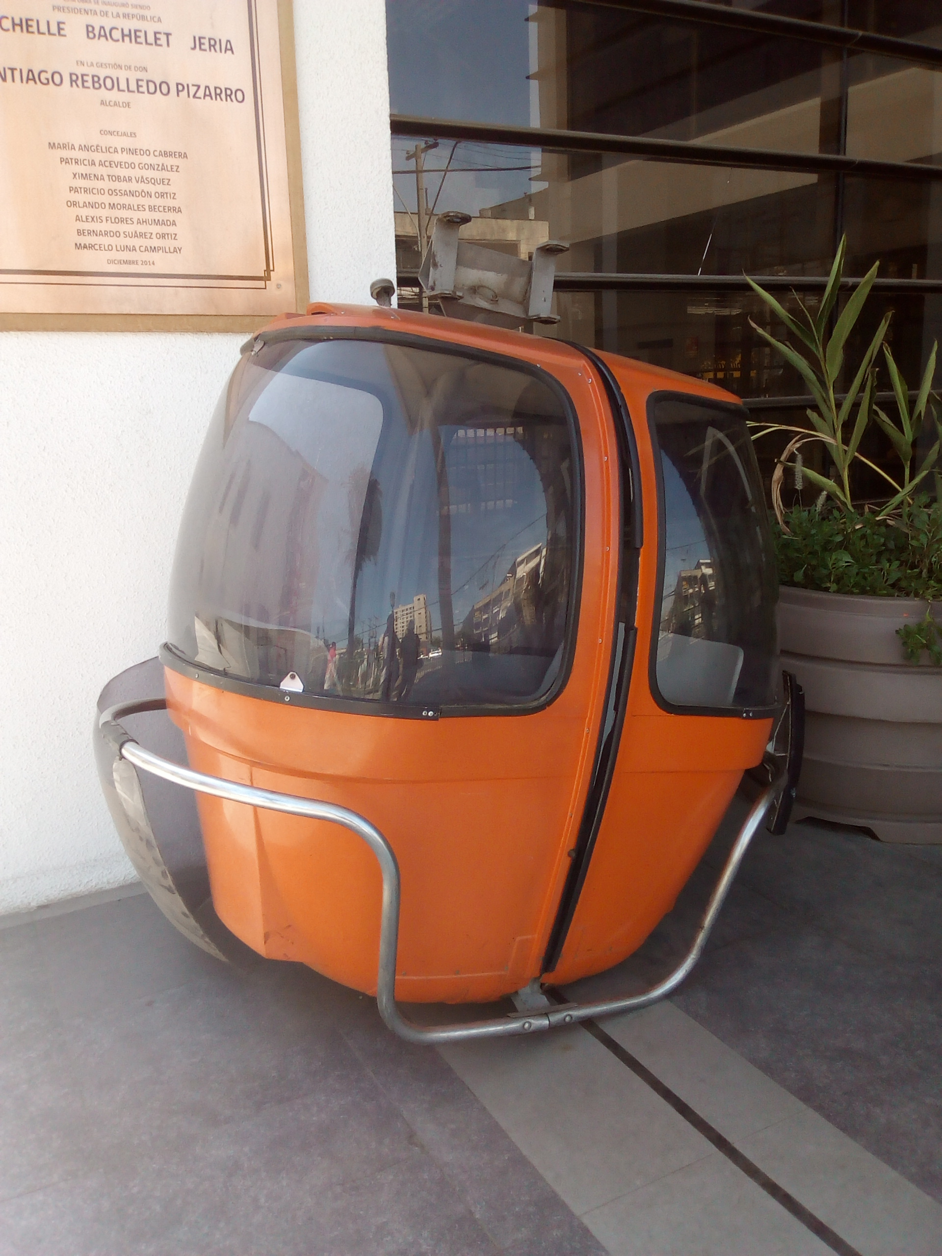 Cabina en desuso del teleférico de Santiago, en exhibición en la Municipalidad de La Cisterna.